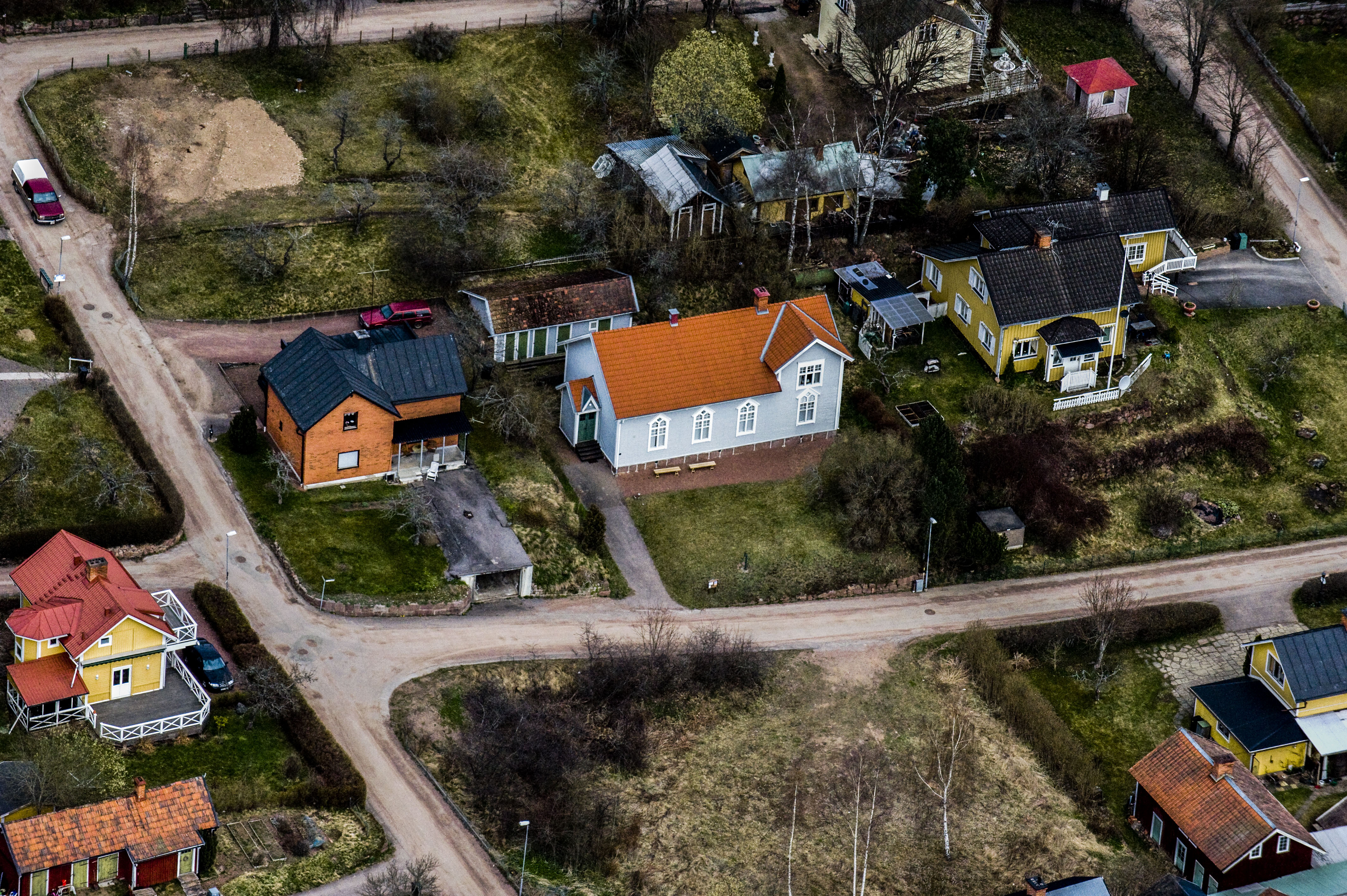 Sionskapellet i Sommen från luften